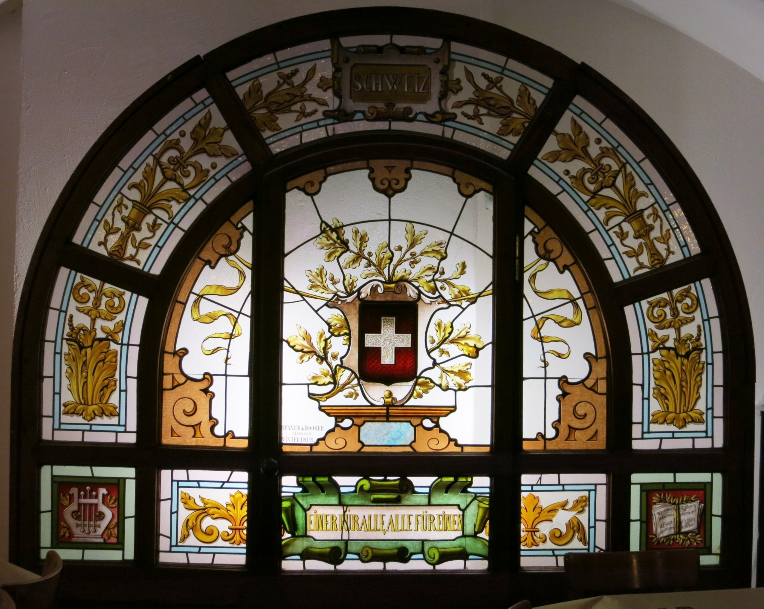 Glasmalerei, Schloss Braui, Nürensdorf ZH, Schweiz